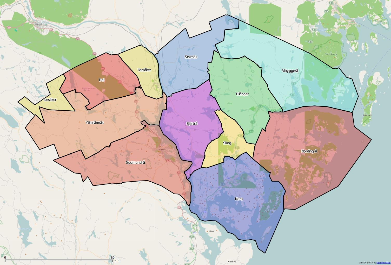 Distriktsindelningen i Kramfors kommun World file: 120.70496653680227439 0 0 -120.70496653680227439 1904206.34611302893608809 9152791.7461374644190073